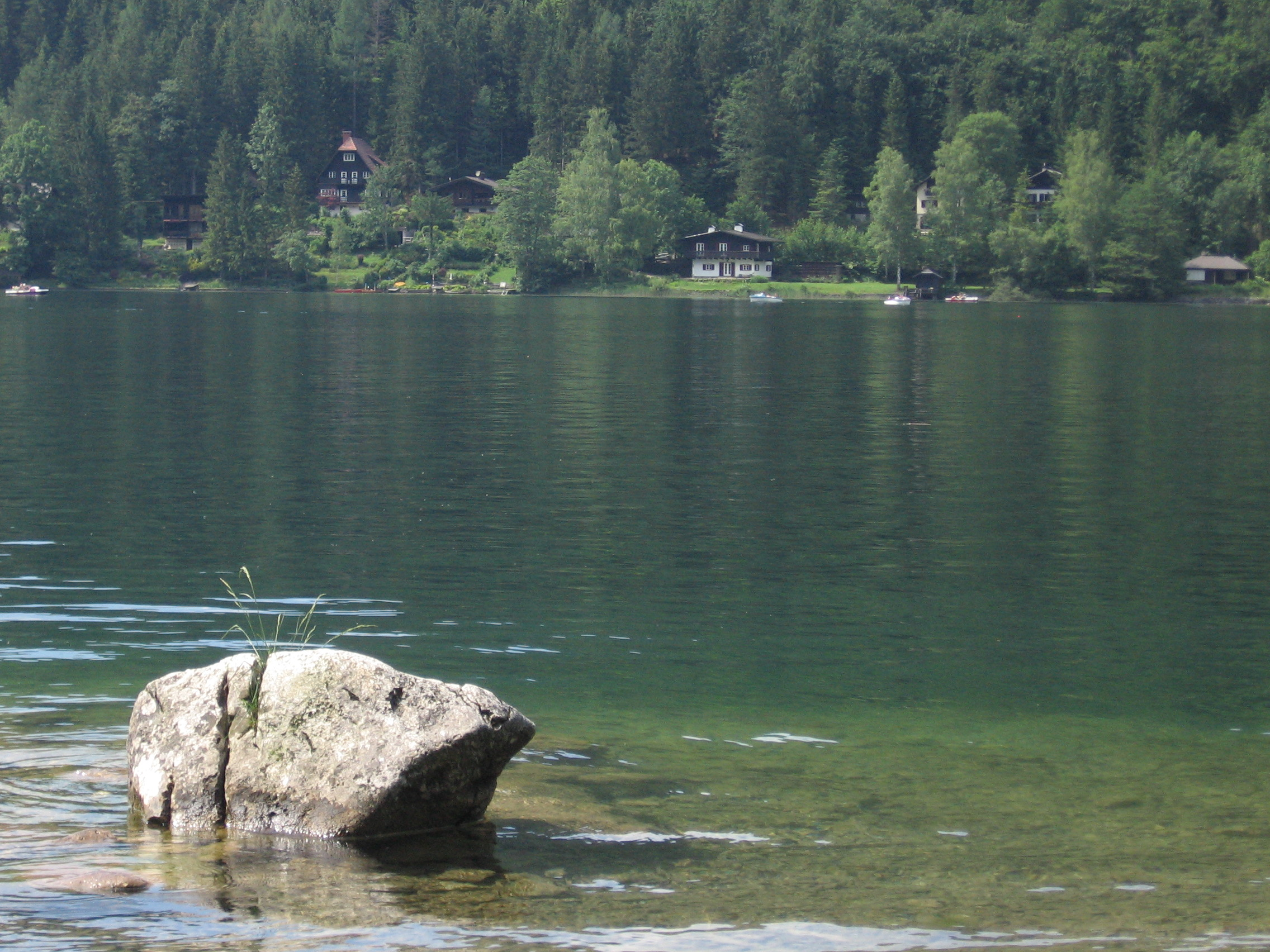 Lunzer See